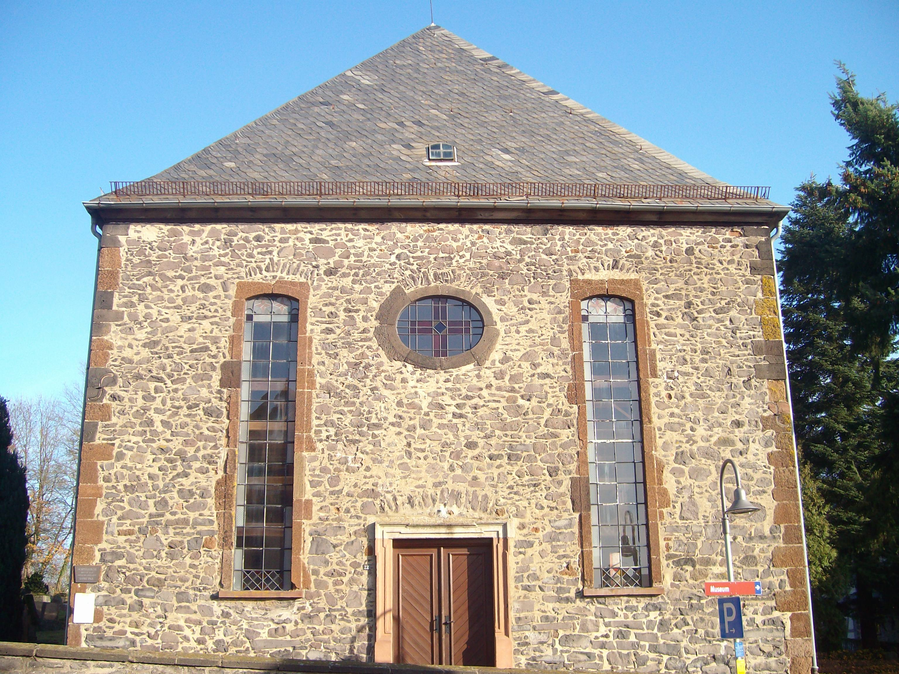 Hospitalkirche Grünberg, Landkreis Gießen, Hessen, Deutschland